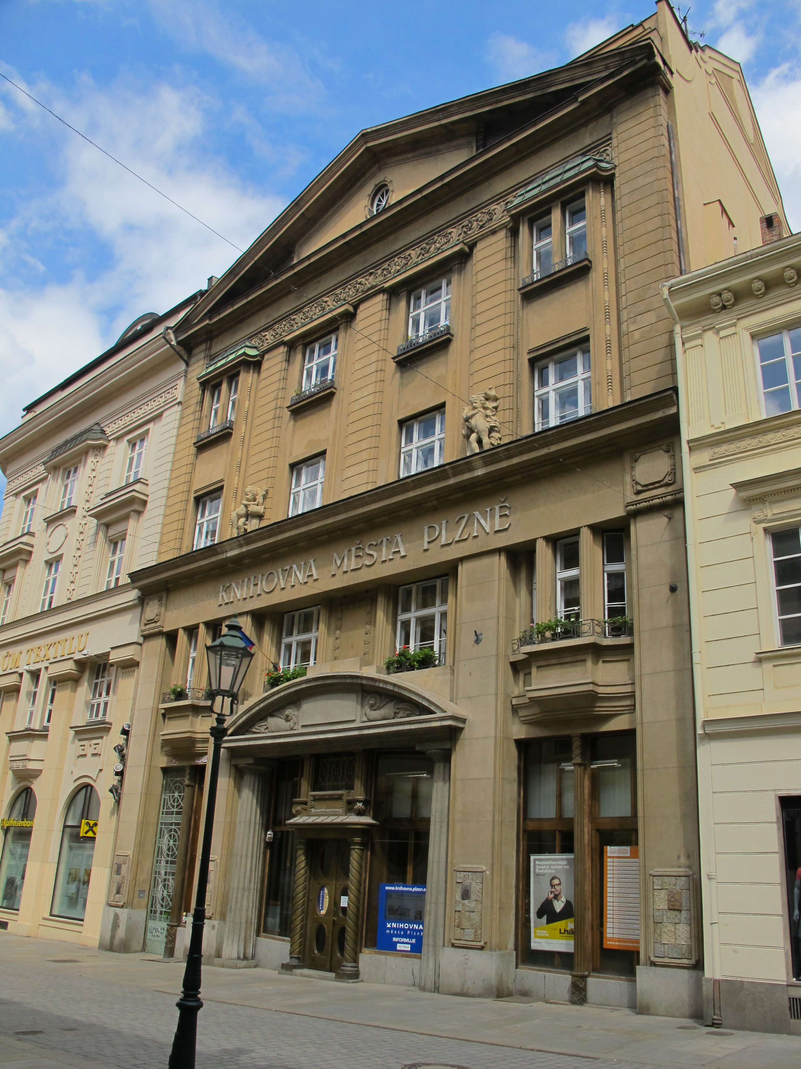 Knihovna města Plzně, Bedřicha Smetany 159/13, Plzeň.